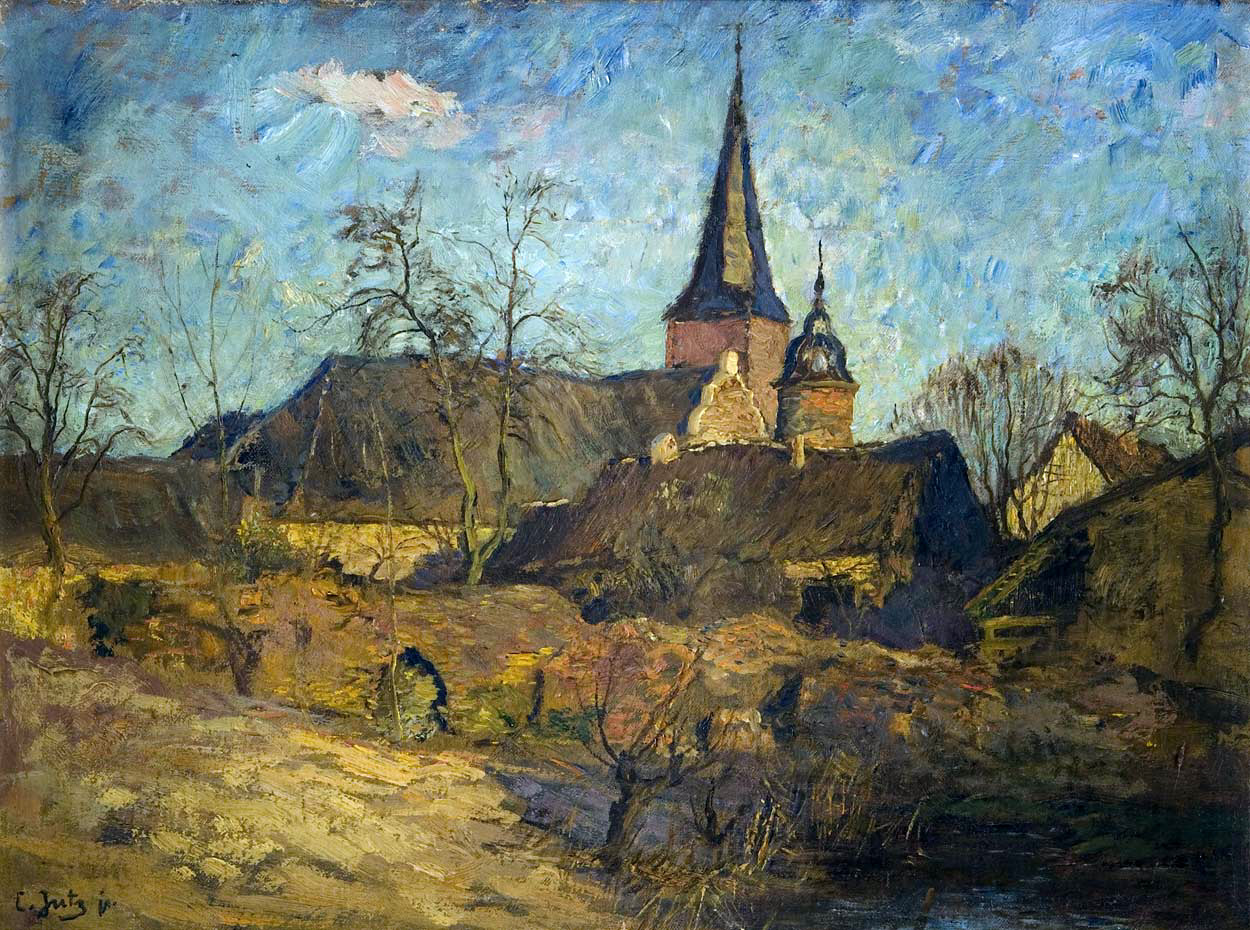 "Dorflandschaft", Öl auf Leinwand, signiert "C. Jutz jr.", 41 x 55 cm